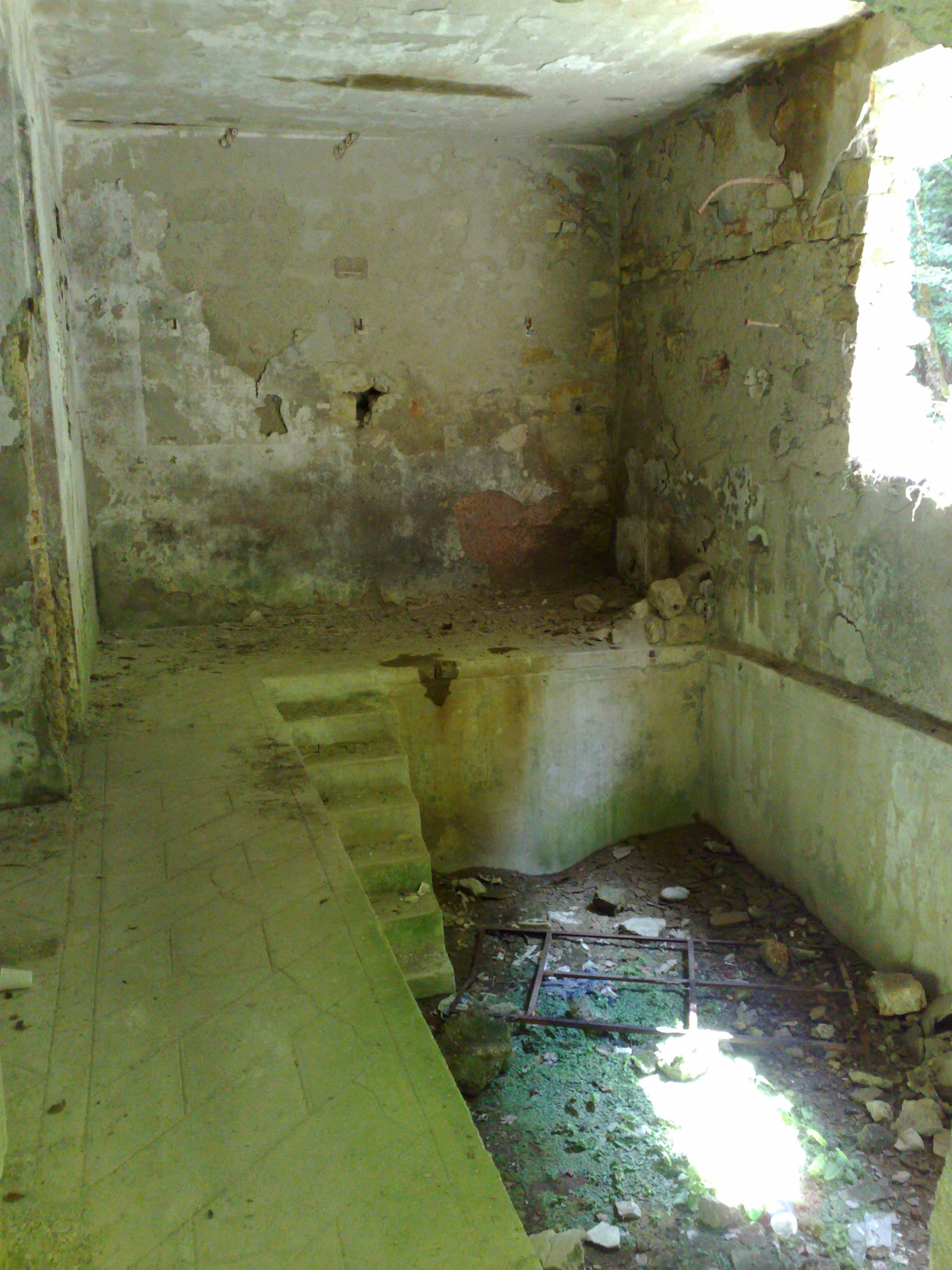 L'un des bassins des anciens bains de la Caille en Haute-Savoie, France.